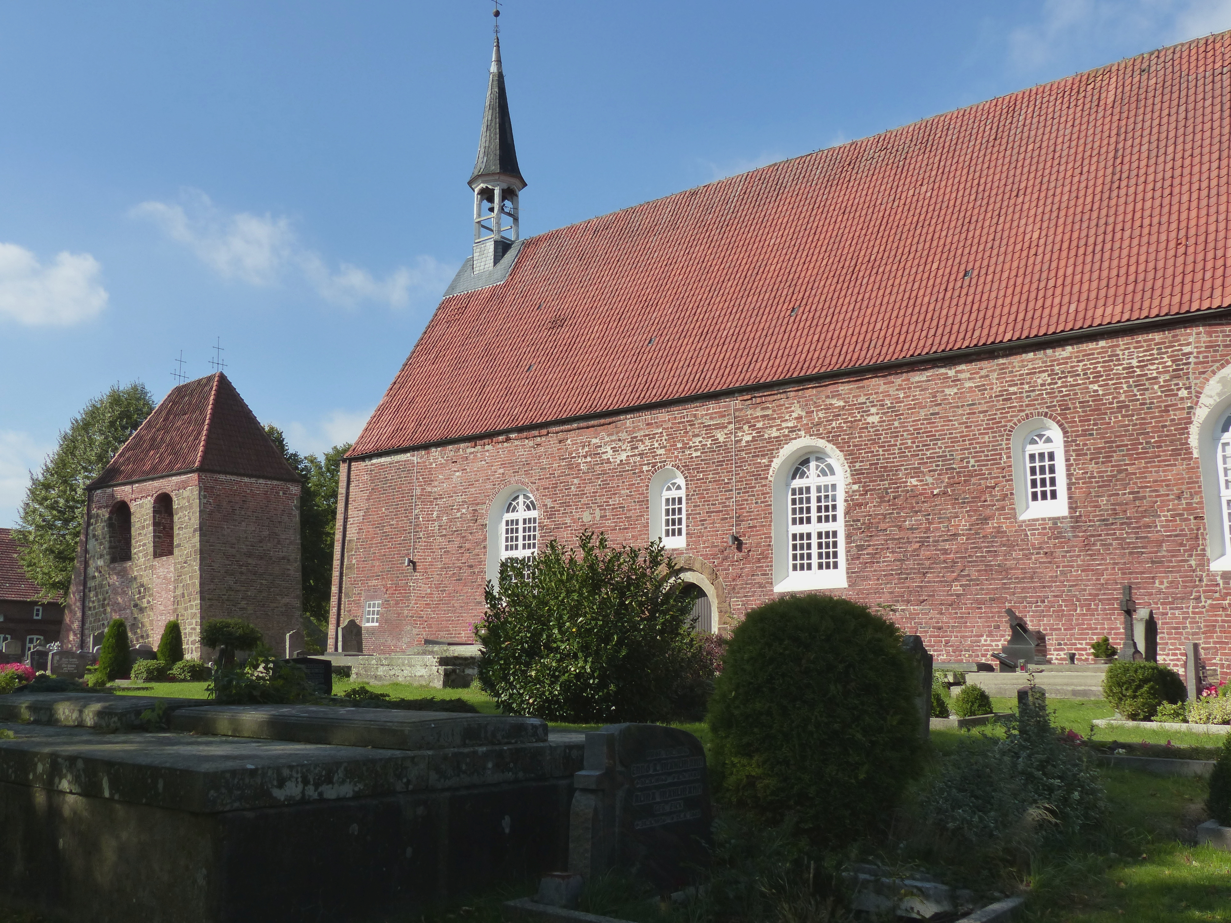 Dorfkirche Golzwarden, Schiff und Turm von Süden